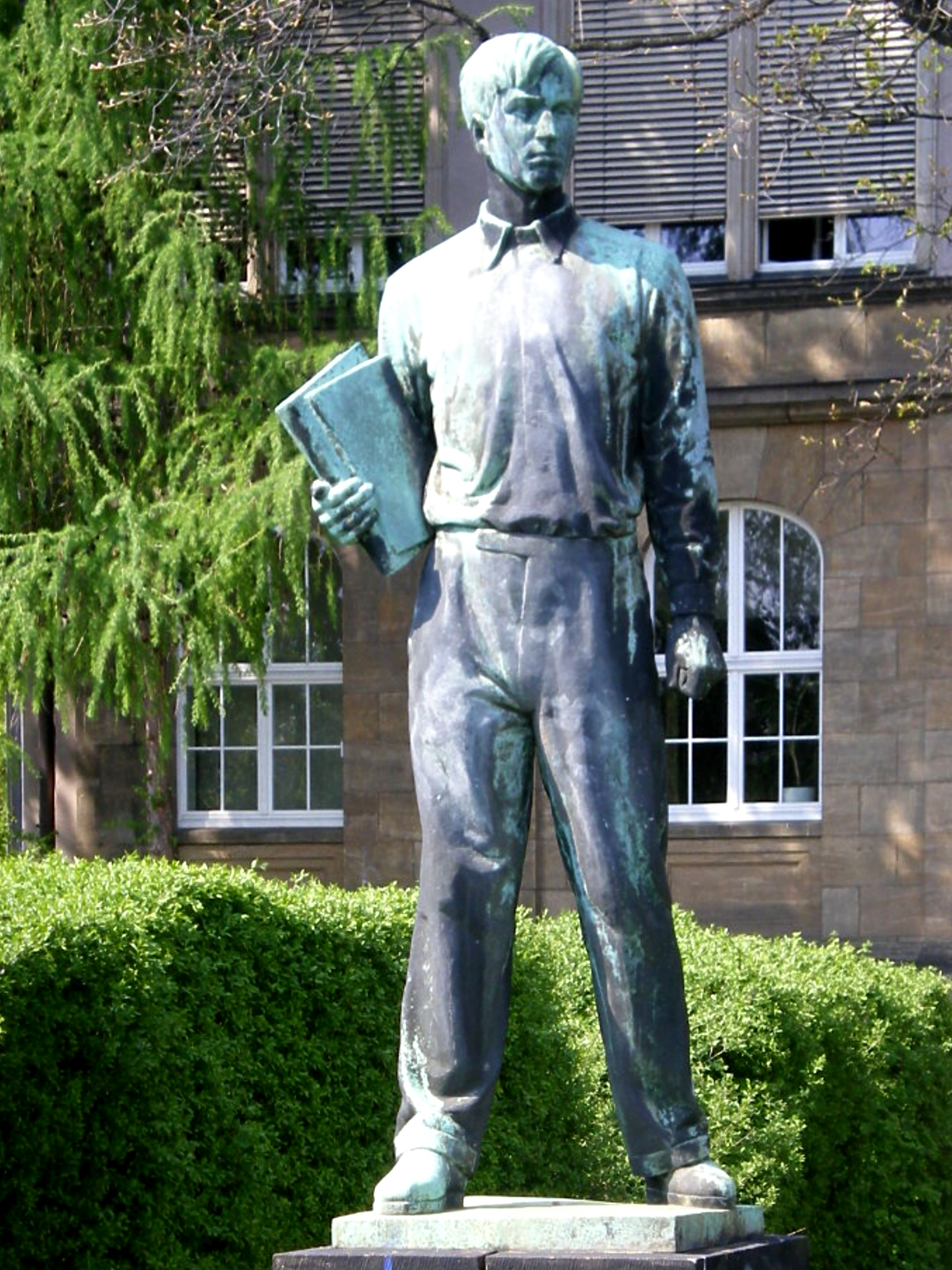 Piroch, Max: Arbeiterstudent, 1958, Bronze. Vor der ehem. Fachschule für Eisenbahnwesen („Schaffnerschule“), heute Berufsschulzentrum, Strehlener Platz, Dresden-Südvorstadt